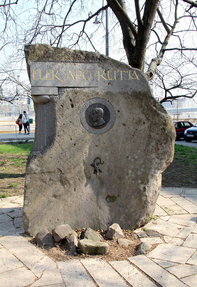 Elek Apó budai kútja Budán